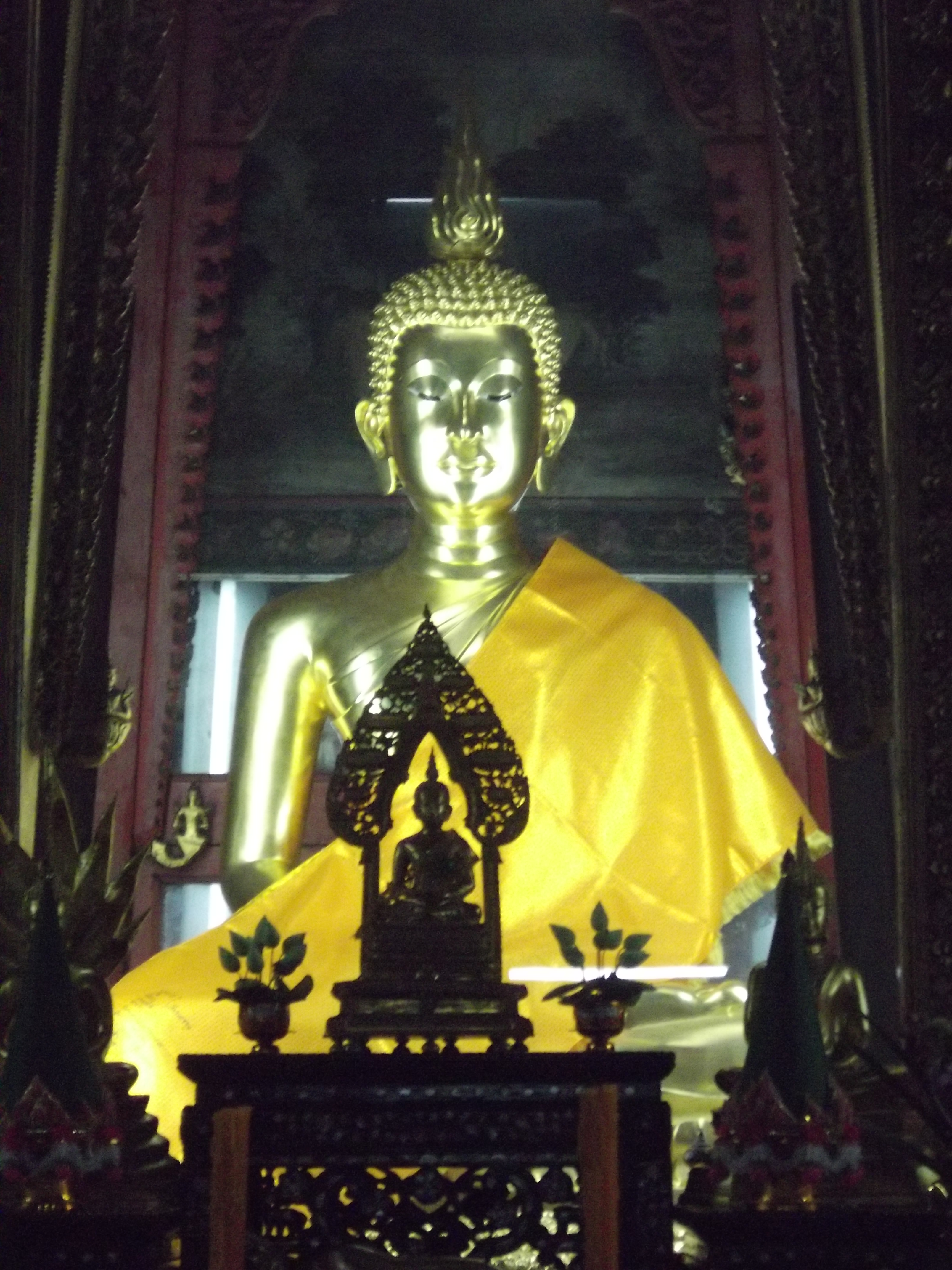 วัดกันมาตุยาราม